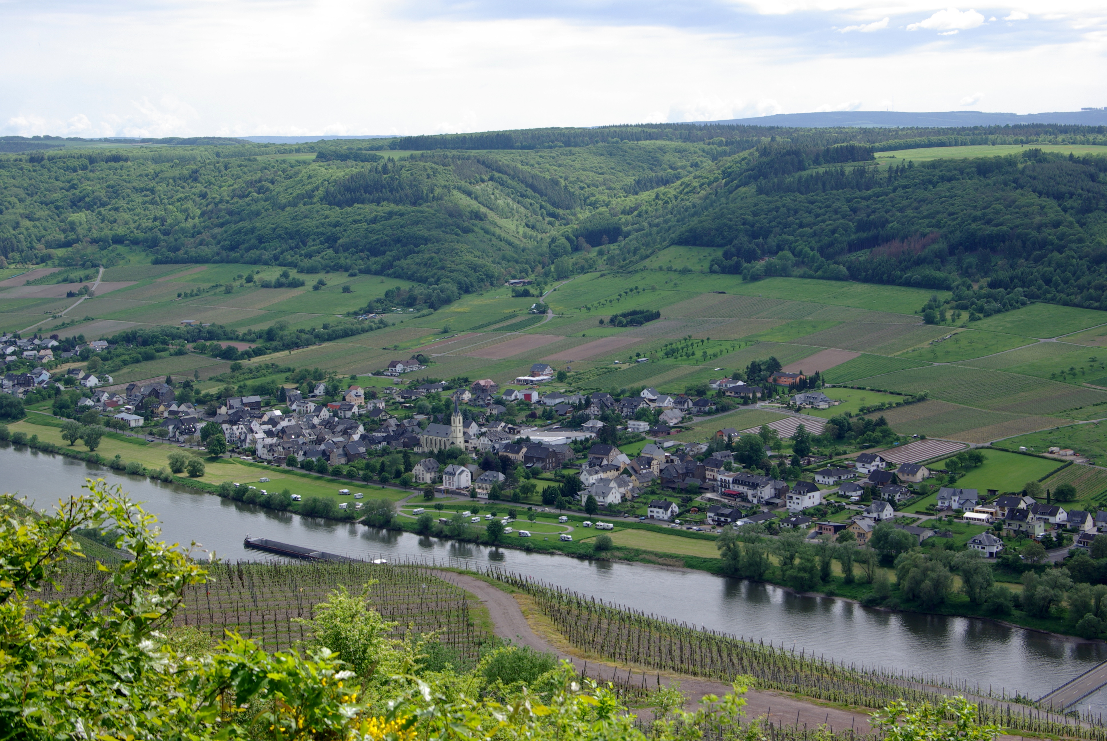 Lösnich